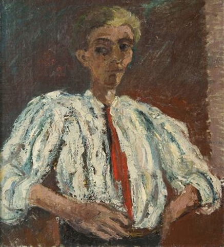 Self portrait